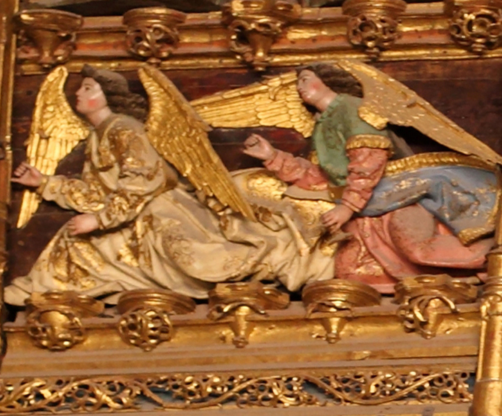 Detalle del retablo mayor de la Catedral de Toledo (España)